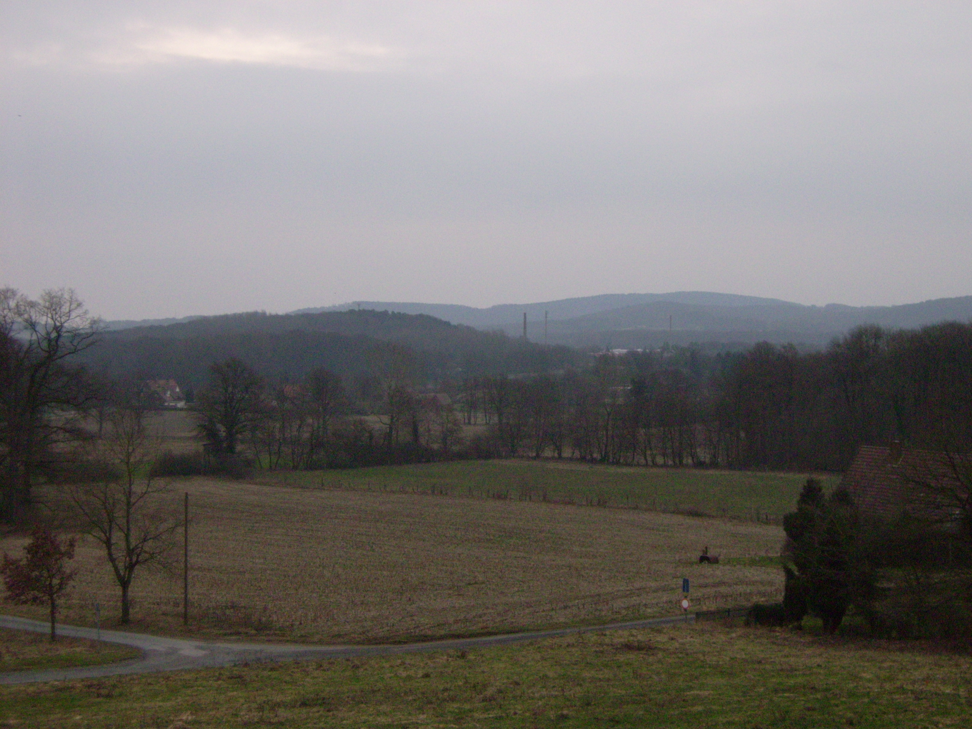 Blick vom Fangberg in Tecklenburg-Leeden nach Nordosten auf den Hüggel